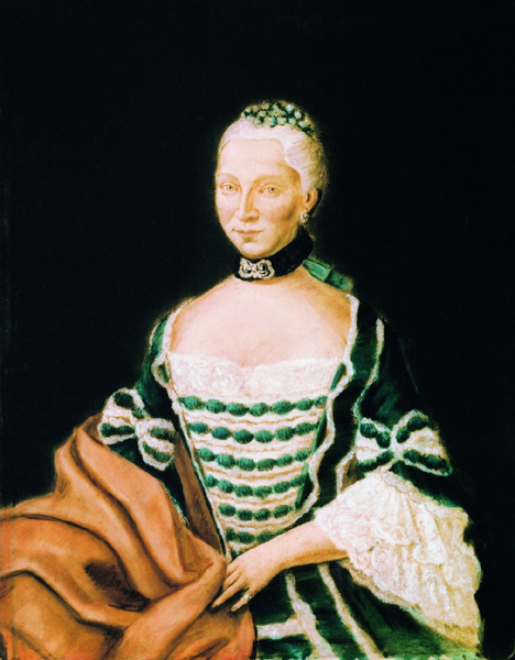 Aletta Haniel, Gemälde von 1780